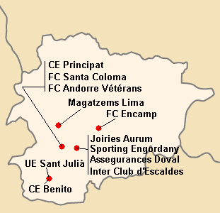 Répartition des clubs en Divisio 1A 1997-1998.